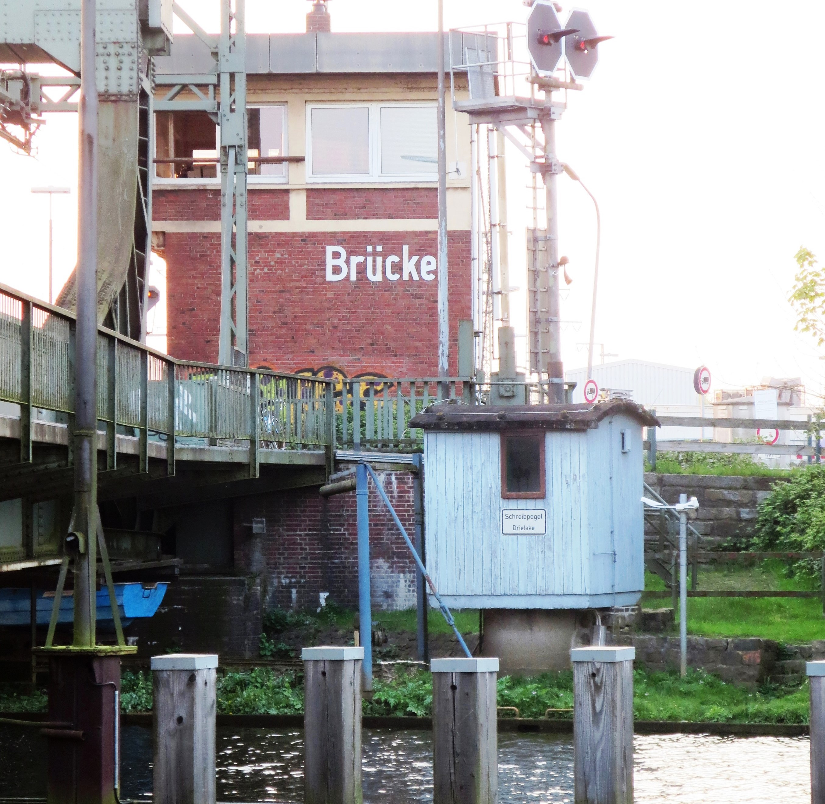 Schreibpegel Oldenburg-Drielake an der unteren Hunte.